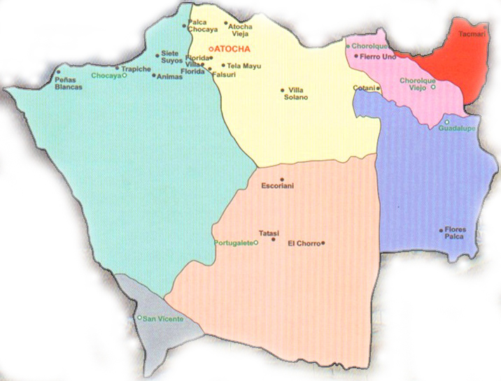 Mapa Politico del Municipio de Atocha